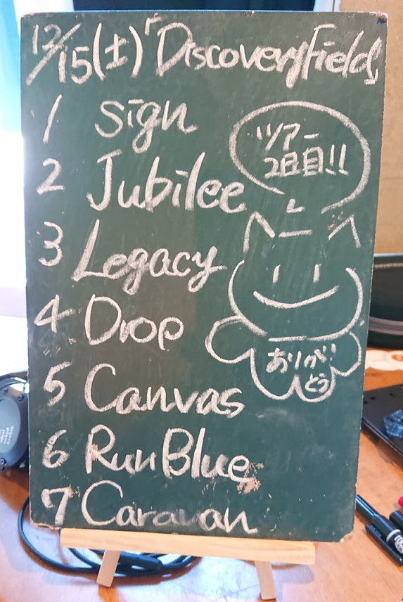 amiinAセトリボード(20181215(1))